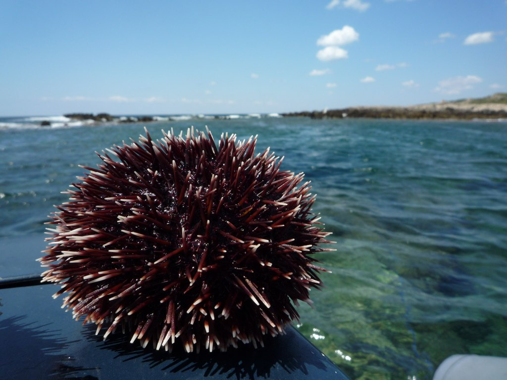 Riccio di mare (Sphaerechinus granularis) in Italia.